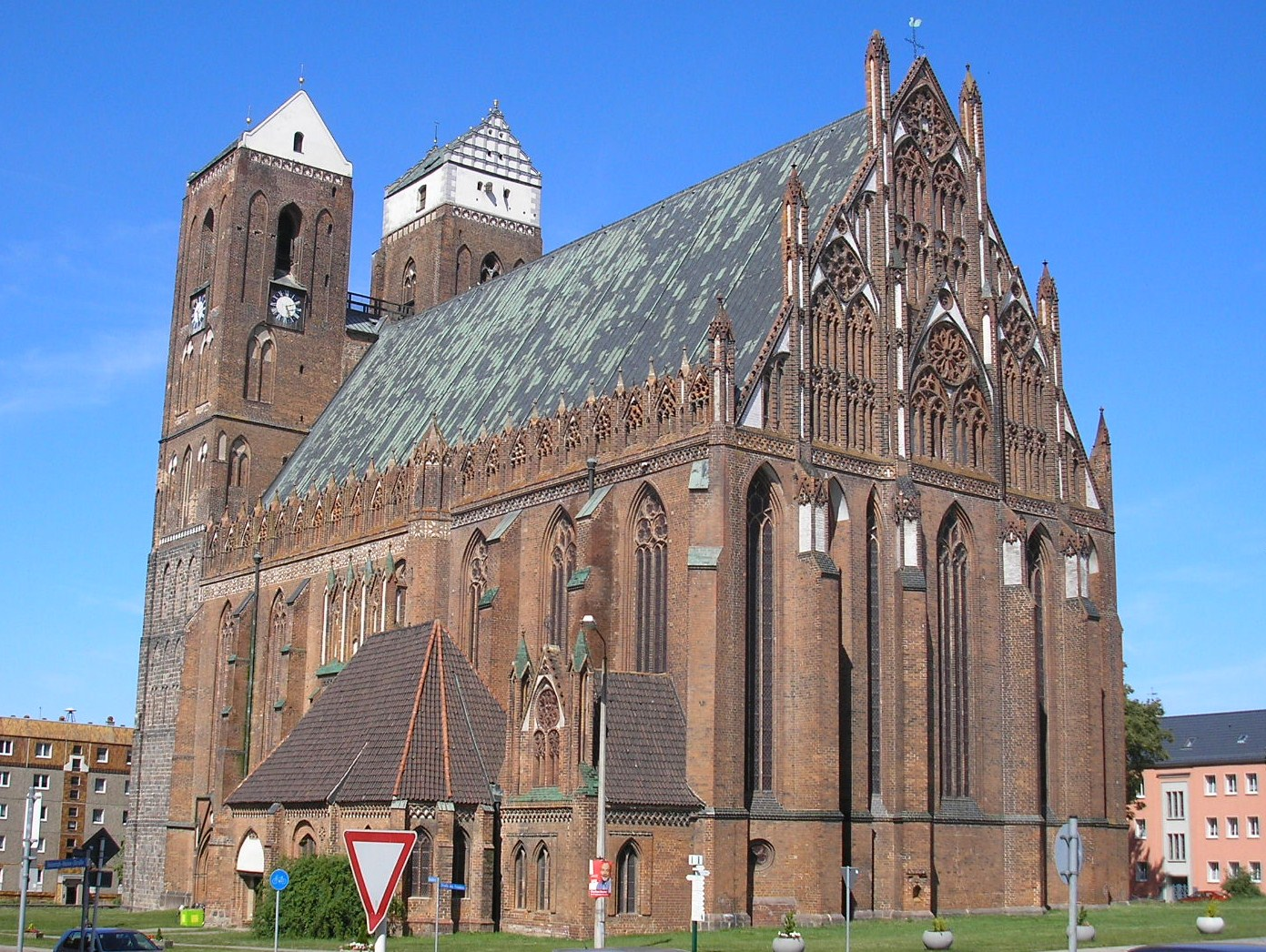 Die Marienkirche in Prenzlau (Brandenburg).